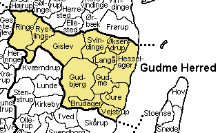 Gudme Herred Svendborg Amt, Denmark. Map by Svend-Erik Christiansen, edited by user:Nico-dk .